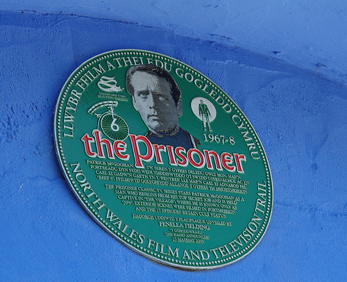 Placa Conmemorativa de la serie The Prisoner en la Villa de Portmeirion